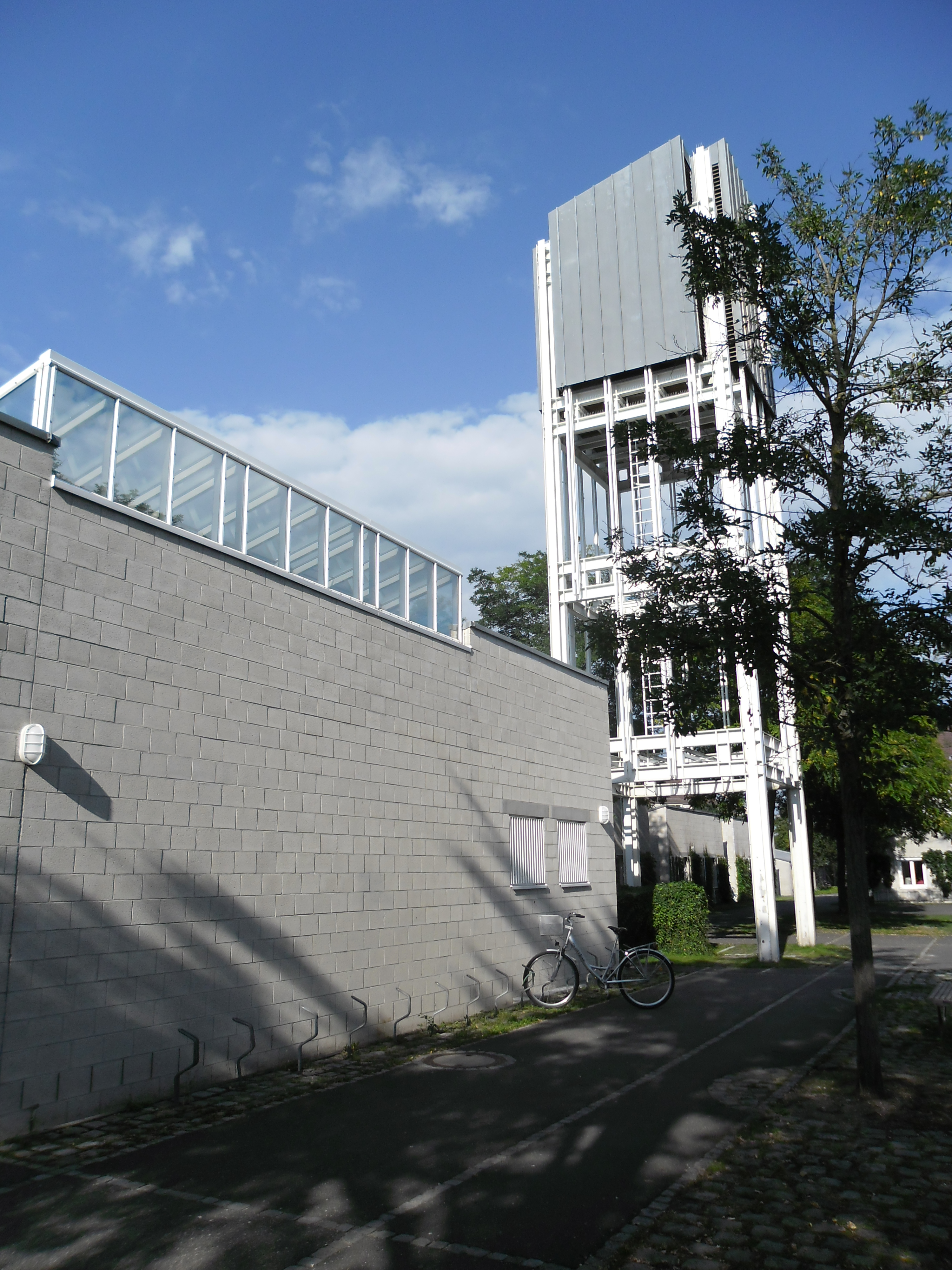 Nördlich des Euckenweges im Stadtbezirk Langwasser Nordost teilt sich die katholische Kirche Sankt-Maximilian-Kolbe im Westen mit der evangelischen Martin-Niemöller-Kirche im Osten einen gemeinsamen Campanile.